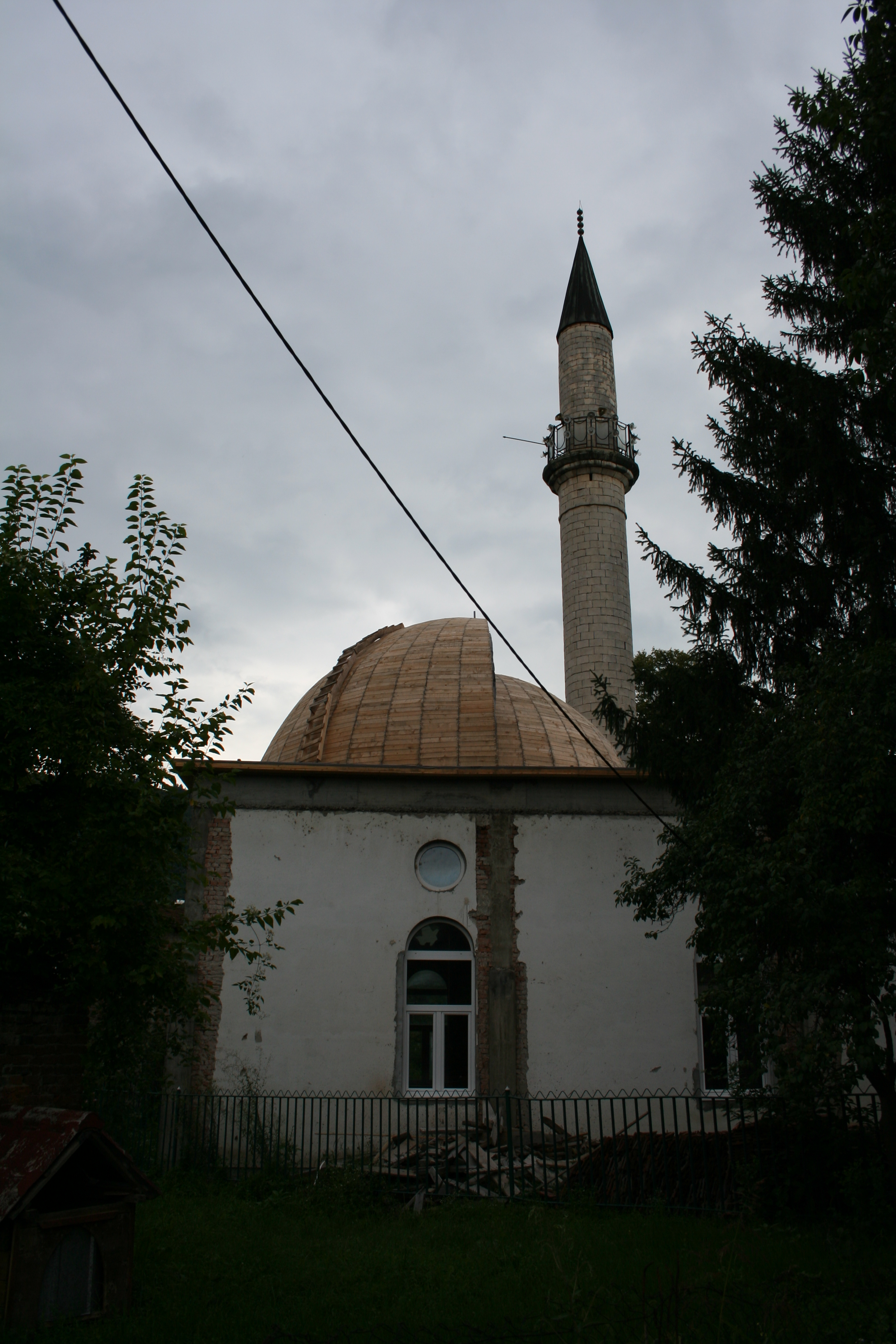 Džamija Mali Zvornik